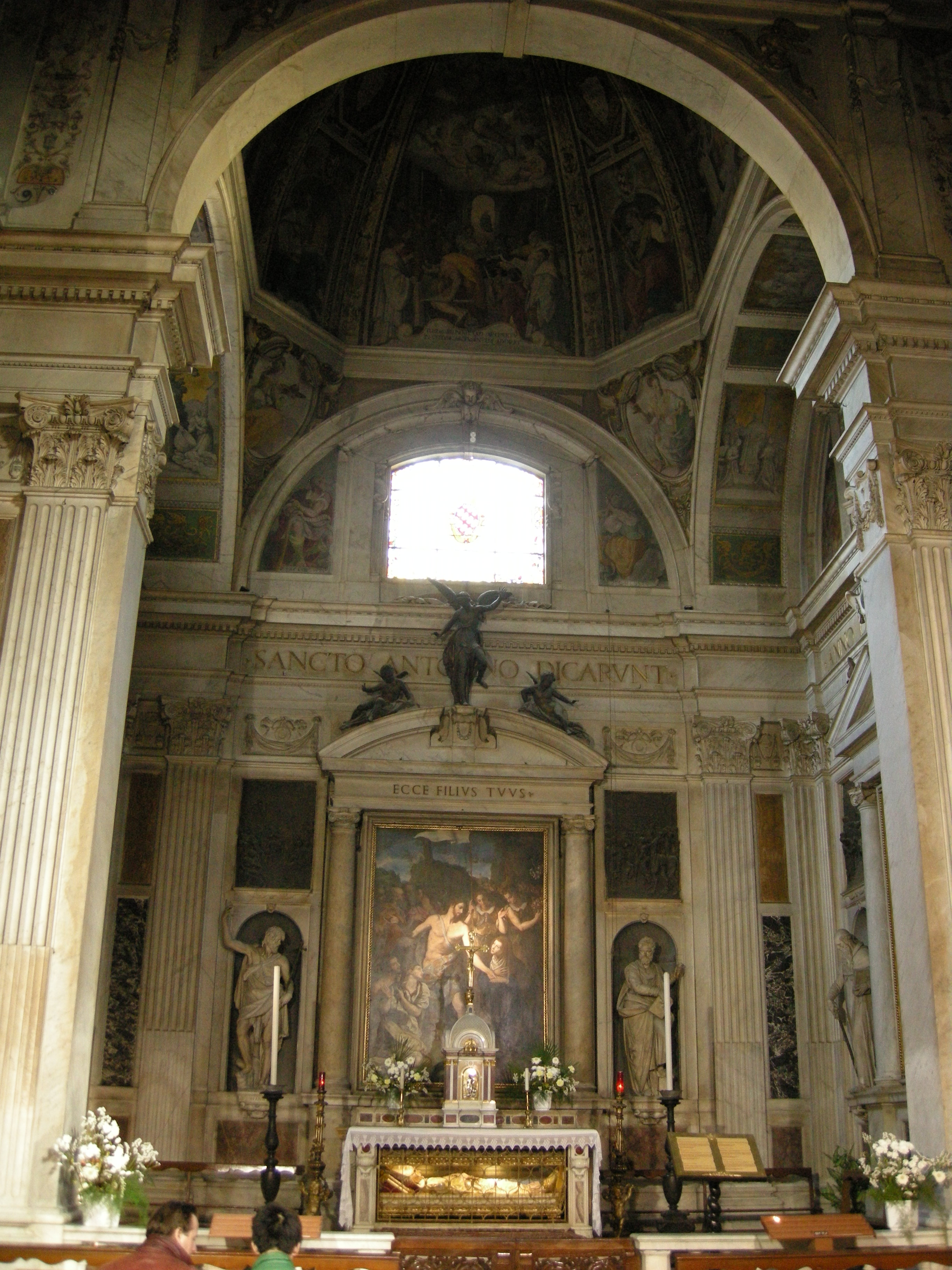 San marco, firenze, cappella salviati